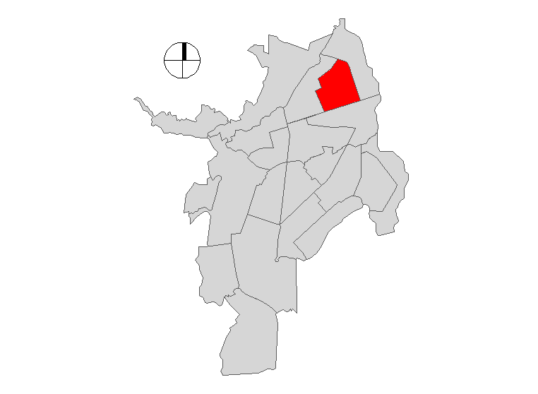 Comuna 5 de Santiago de Cali, Colombia.